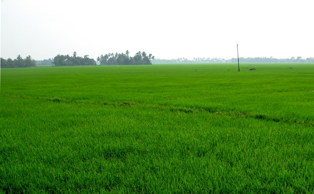 കുട്ടനാട്ടിലെ-നെൽപ്പാടം‌-നെടുമുടിക്കടുത്തുനിന്ന്.